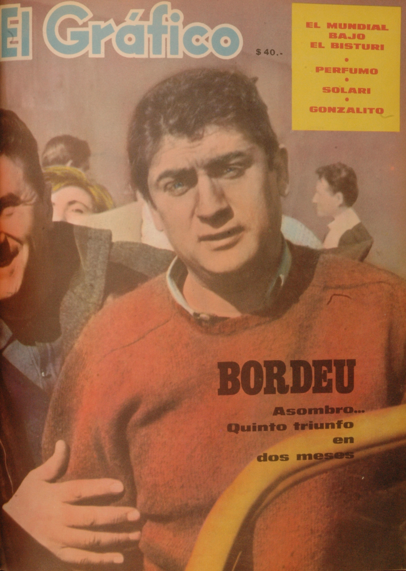 El Grafico del 09 de Agosto de 1966. Edicion 2444